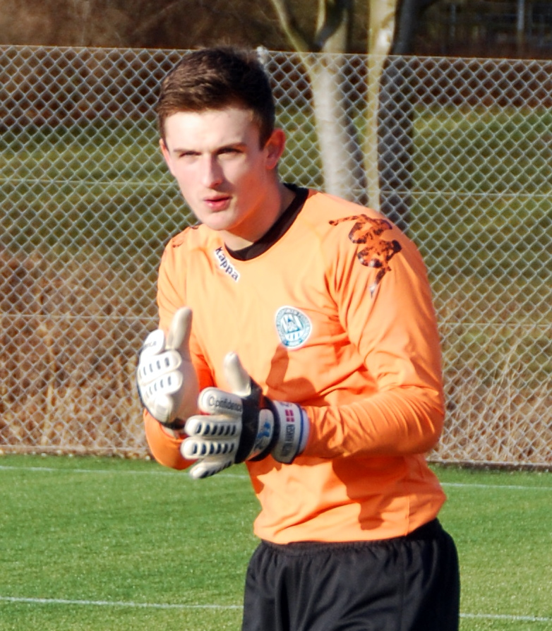 Fodboldspilleren Martin Hansen fra Viborg FF. Her i en testkamp mod Blokhus FC på VFFs træningsanlæg på Kirkebækvej i Viborg.